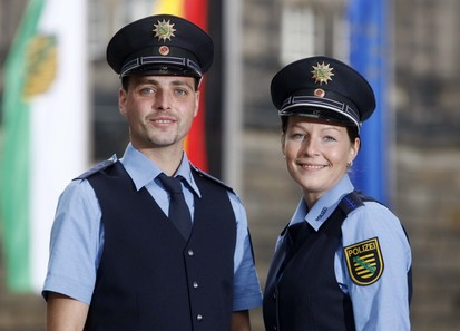 Neue blaue Uniform der Polizeien der Länder Berlin, Brandenburg und Sachsen